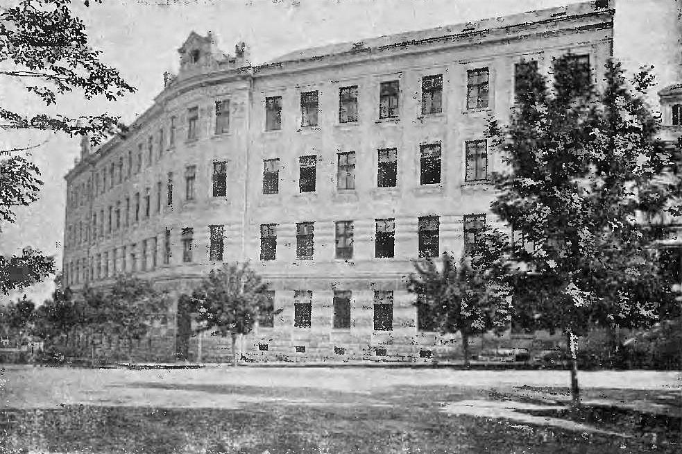 C. K. II Gimnazjum w Tarnopolu (-1912)